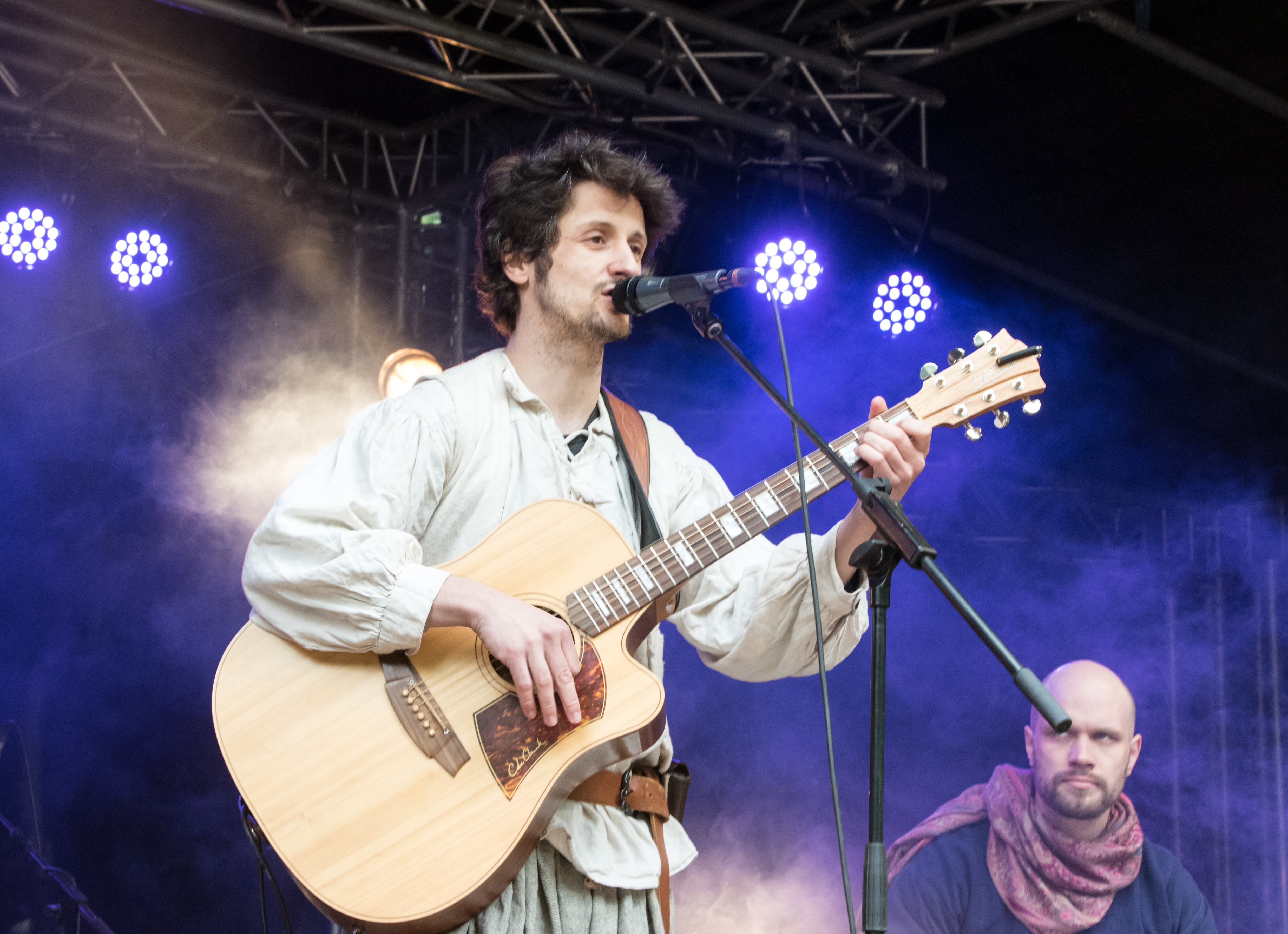 Sören Vogelsang beim MPS Hohenwestedt 2016